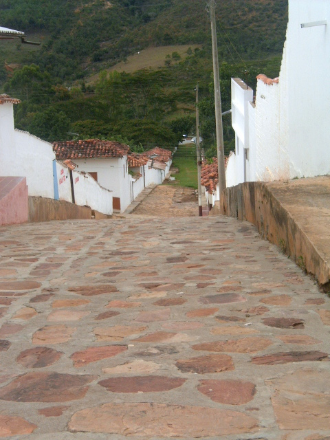 Betulia, Santander, Colombia Imagen propia (del autor) tomada en julio de 2004, que no viola ninguna política de copyright Licencia